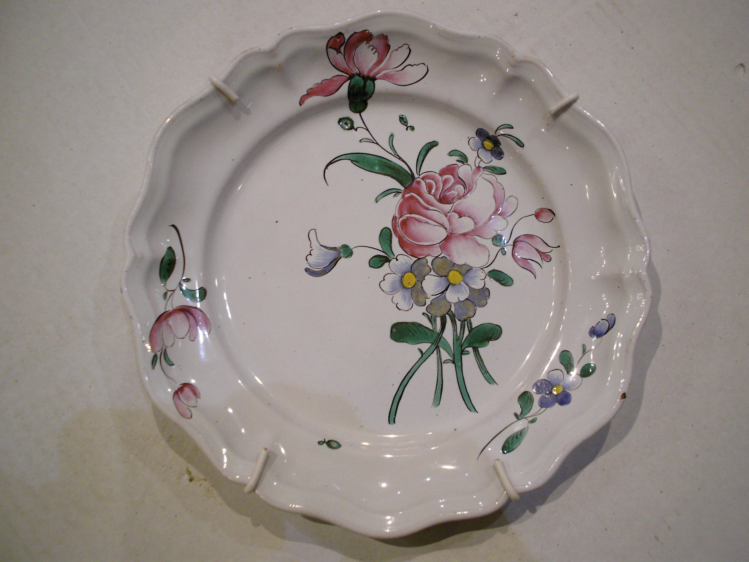 assiette de qualité contournée Joseph hannong, collection privée, Musee du pain d'epice de Gertwiller.